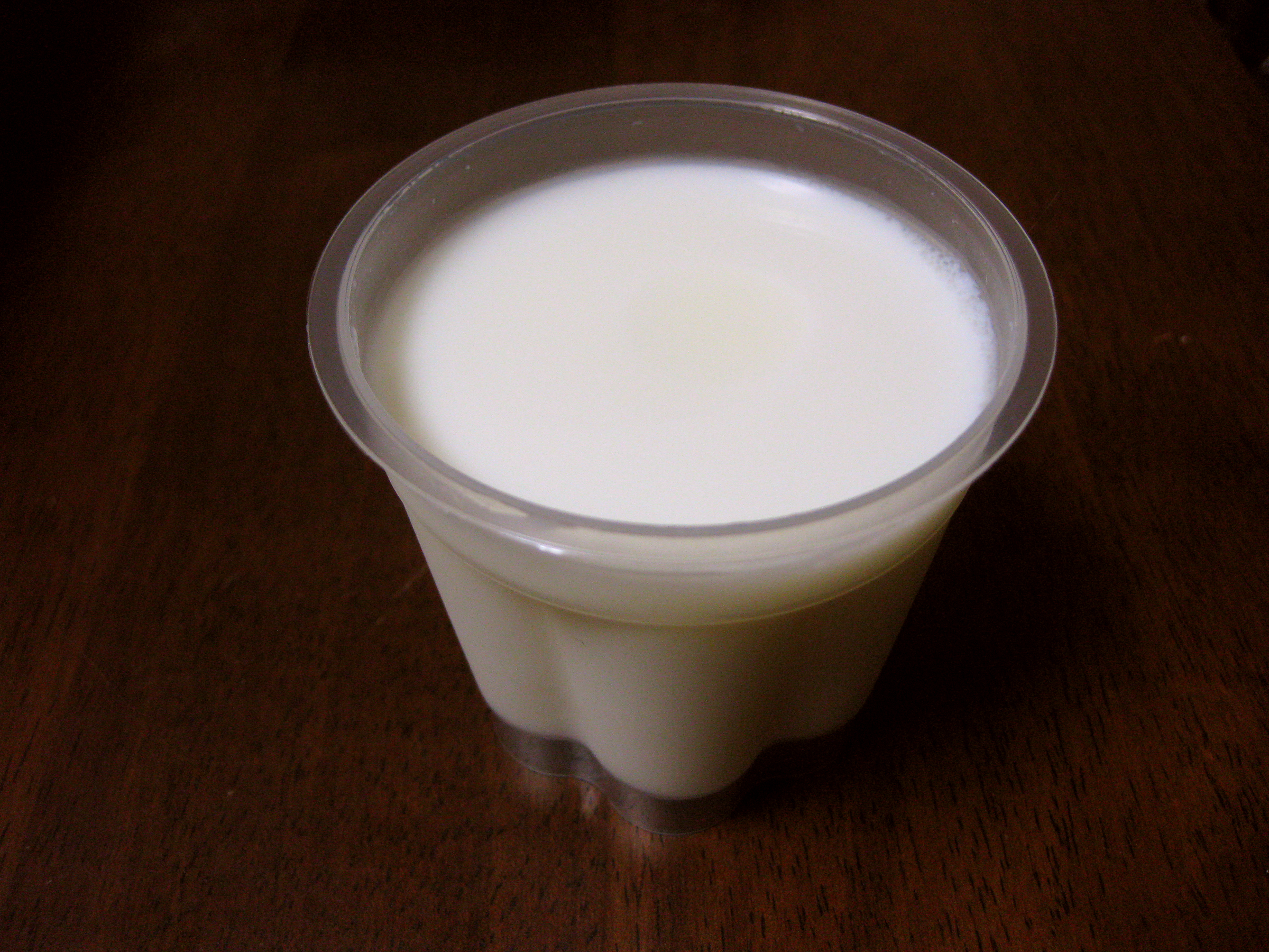 大内山牛乳プリン。おいしいよ。2012年6月15日撮影。